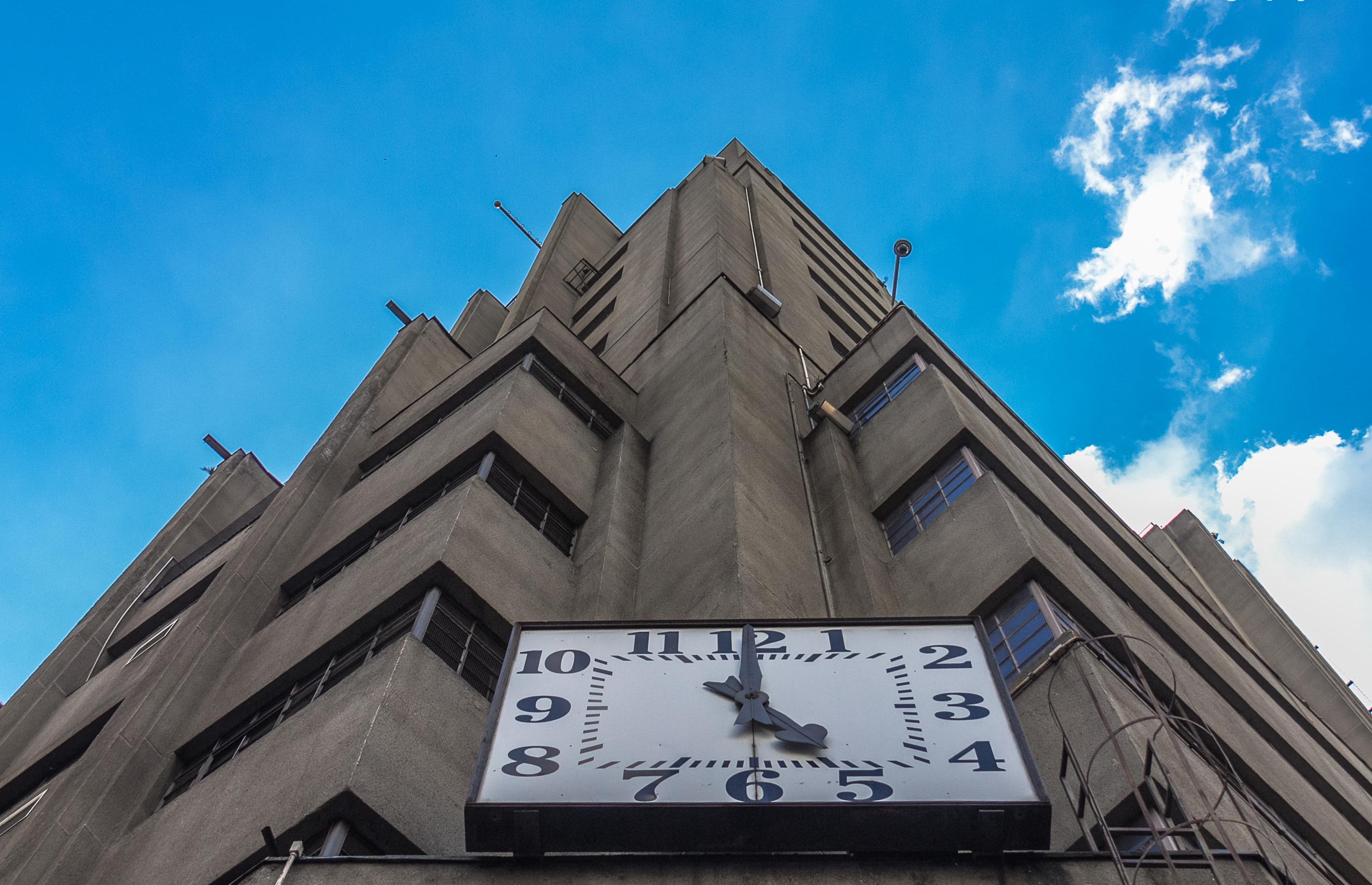 Antigo predio do Mappin praça Ramos,Sao Paulo,2013